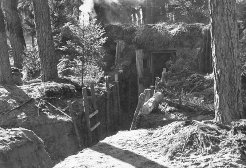 Westwall. Getarntes Blockhaus im Bienwald. Bei Schweighofen an der Lauter, 4 km ostw. Weissenburg. 2.3.40